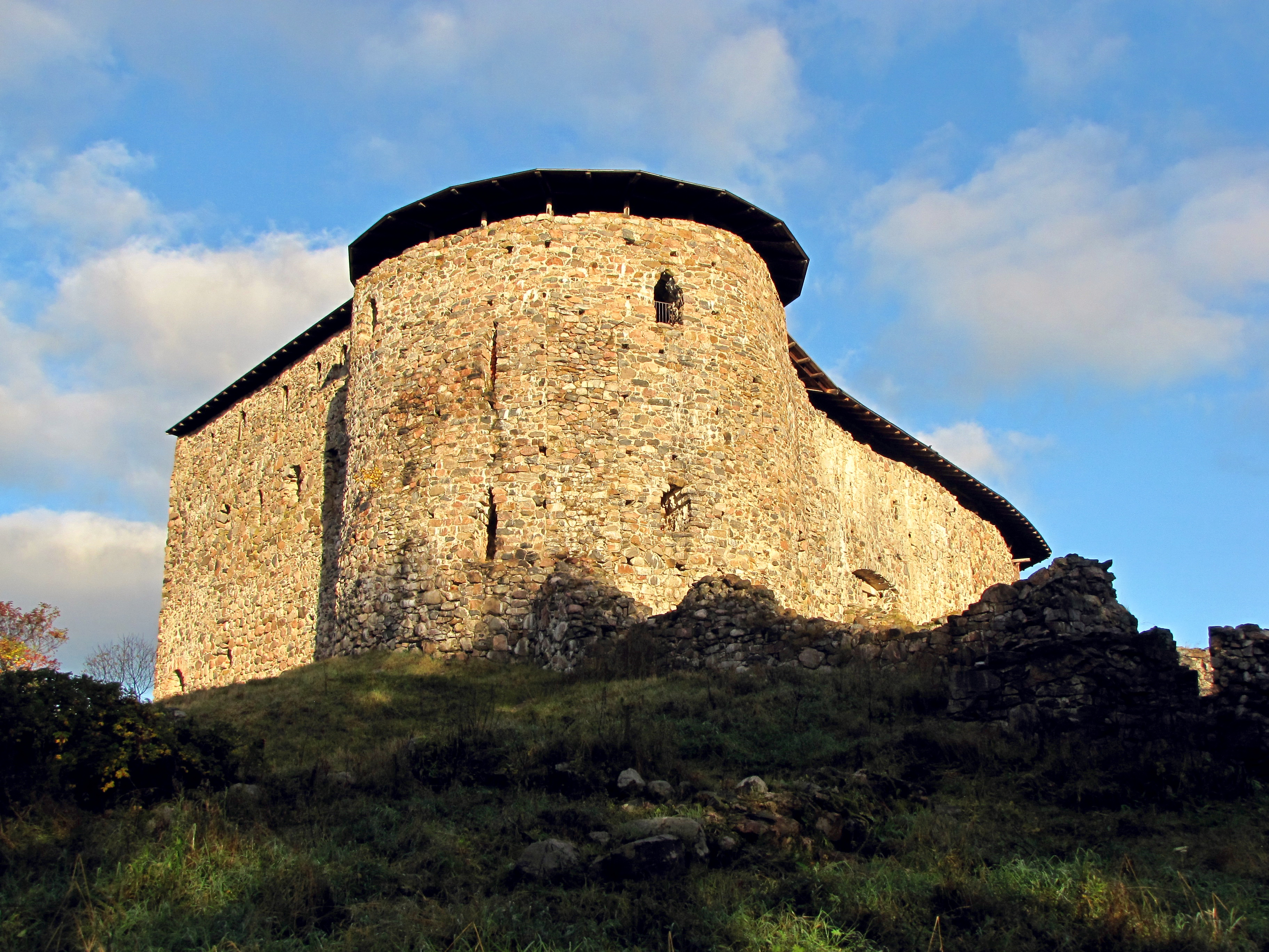 Raseborg castle. Расеборгский замок.